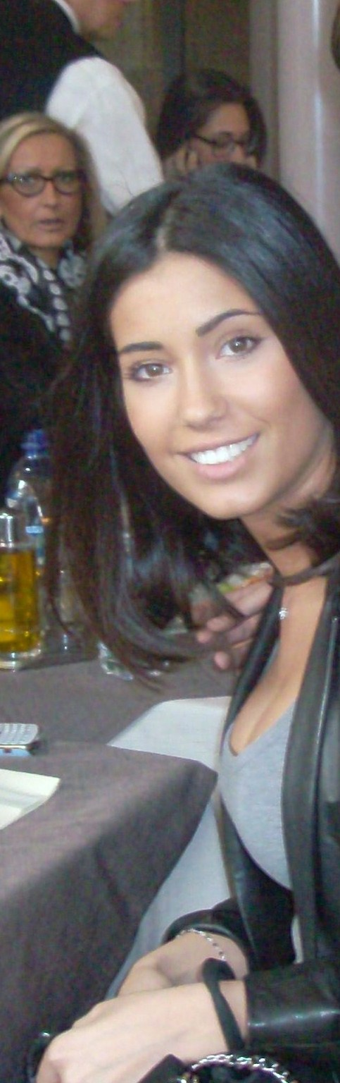 Federica Nargi nel 2012